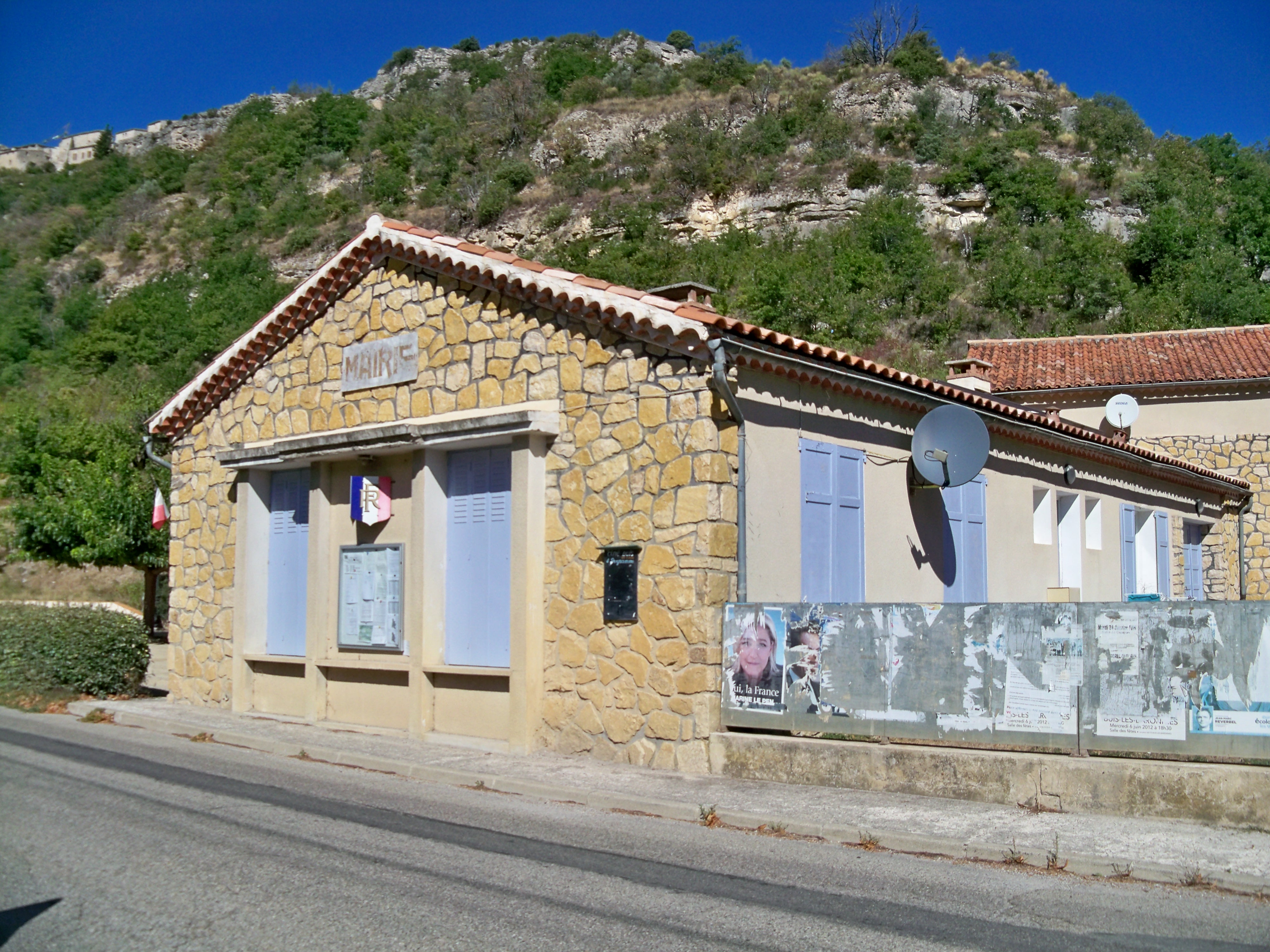 Vercoiran (Drôme, France). La mairie dans le hameau du Moulin, en contrebas du vieux village, que l'on aperçoit perché en haut à gauche.